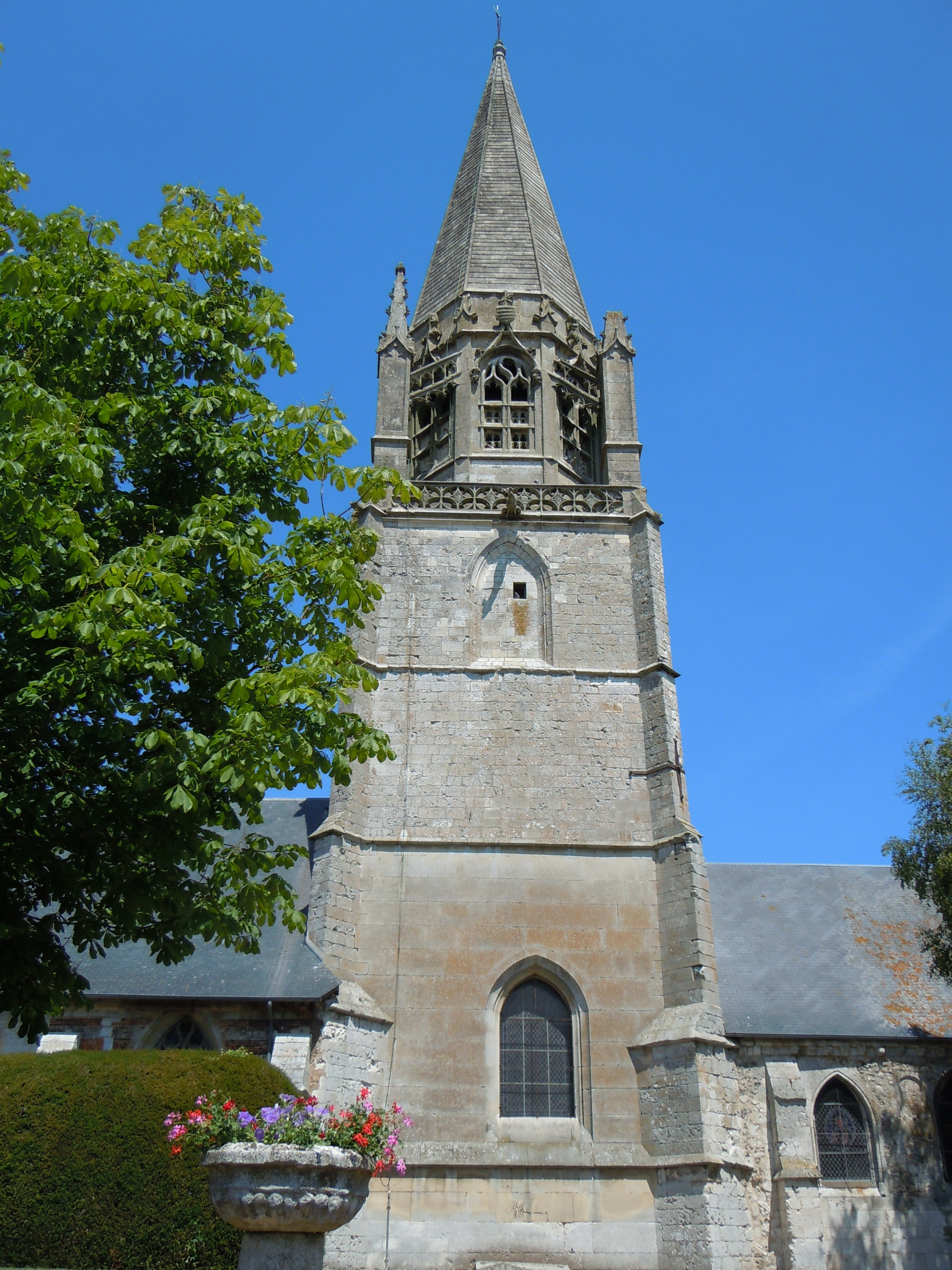 Valliquerville - ( Seine-Maritime) - Eglise Notre-Dame - Clocher